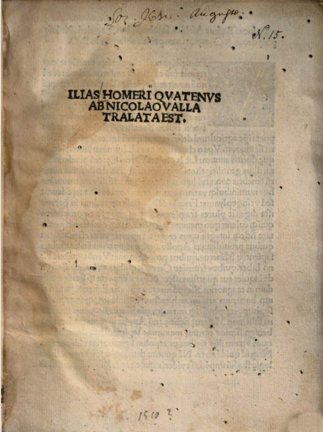 Ilias Homeri quatenus ab Nicolao Valla tralata est title page